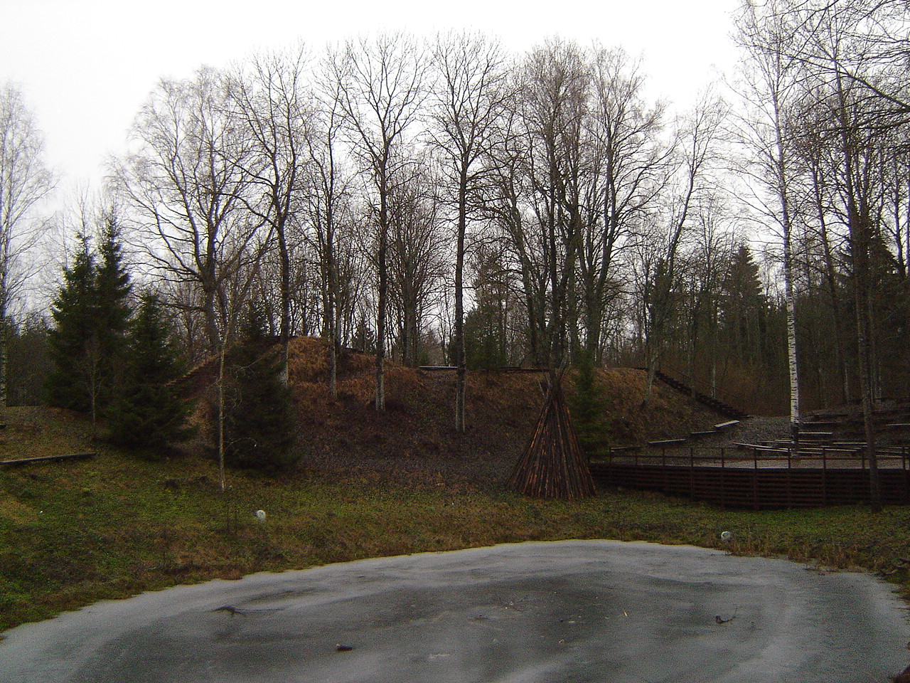 Kassinurme linnuse vallid